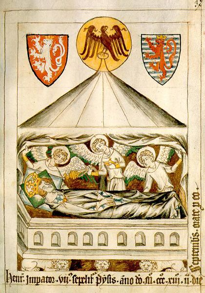 POhřeb JIndřicha VII.